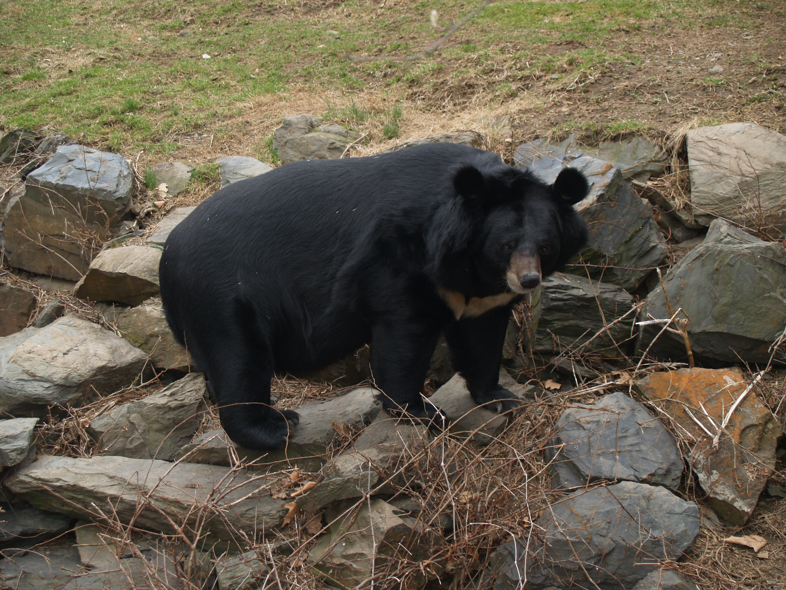 Гималайский медведь (Ursus thibetanus) Гималайский медведь (Ursus thibetanus) в зоопарке Филадельфии